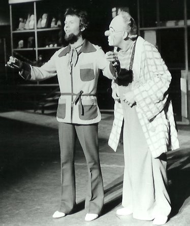 Clown Ferdinand mit dem Zauberpeter Dr. Peter Kersten im Friedrichstadtpalast Berlin